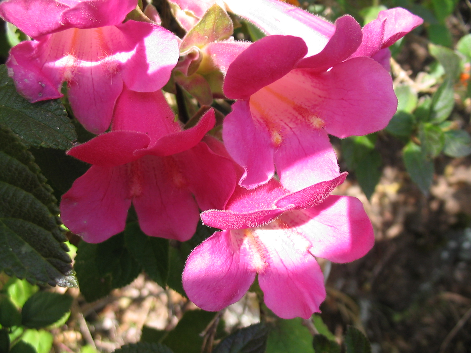 Kletter-Gloxinie (Lophospermum erubescens) - Flower